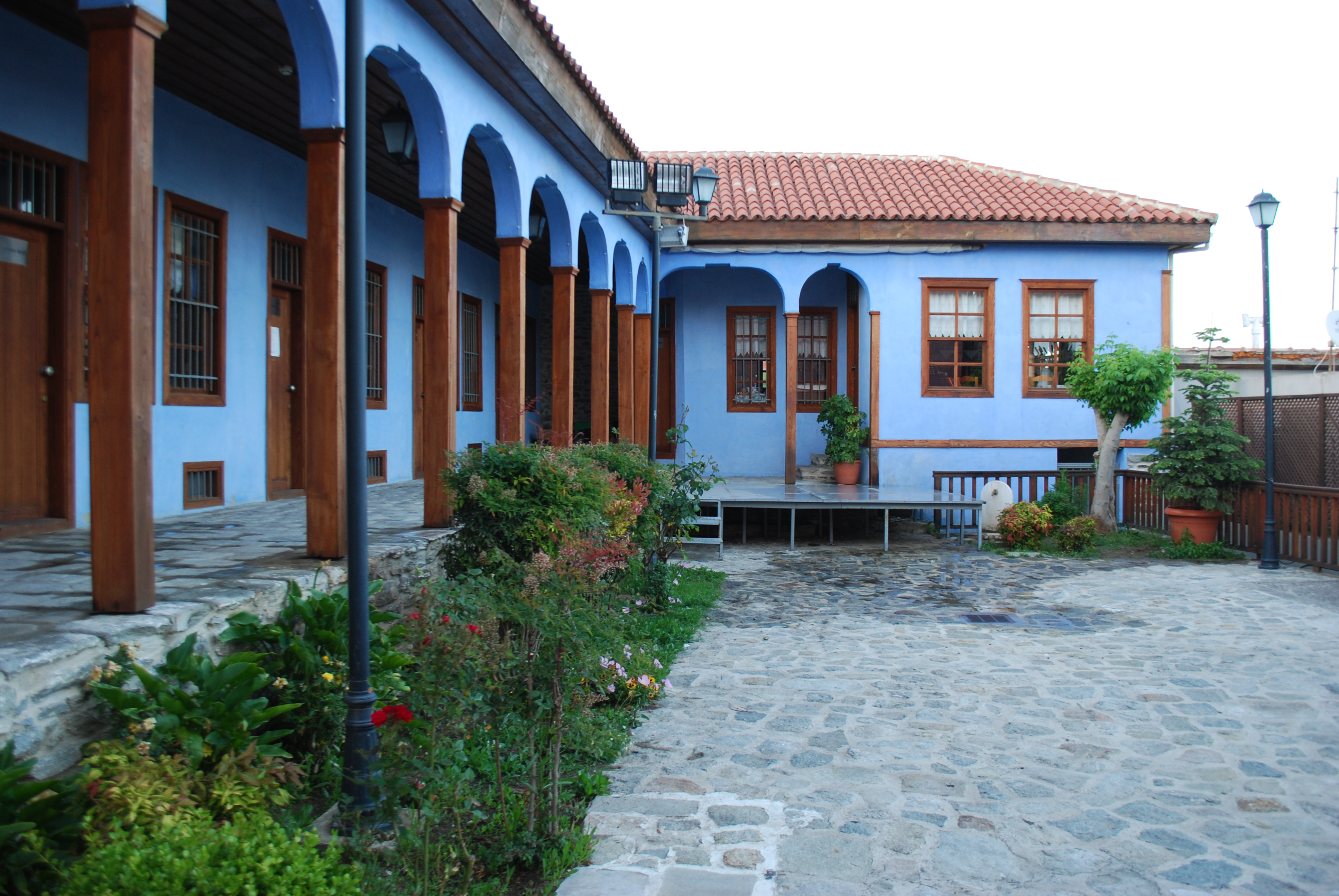 Vue de Kavala (Grèce).